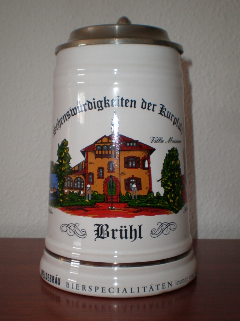 Jarra de cerveza de Brühl (Baden)